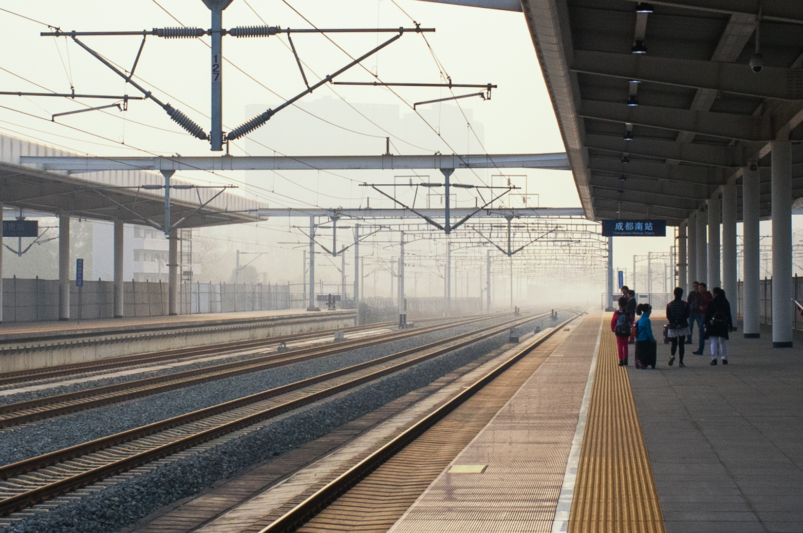 中文（中国大陆）: 成都南站站台